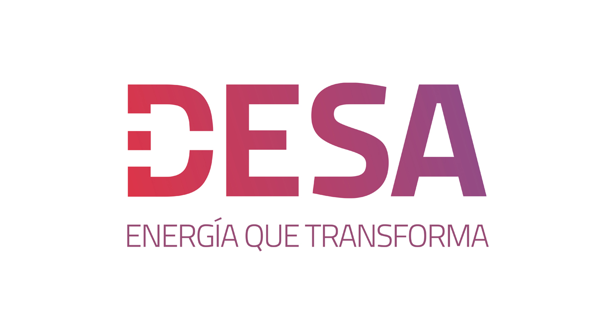 Logo 2020 de DESA.